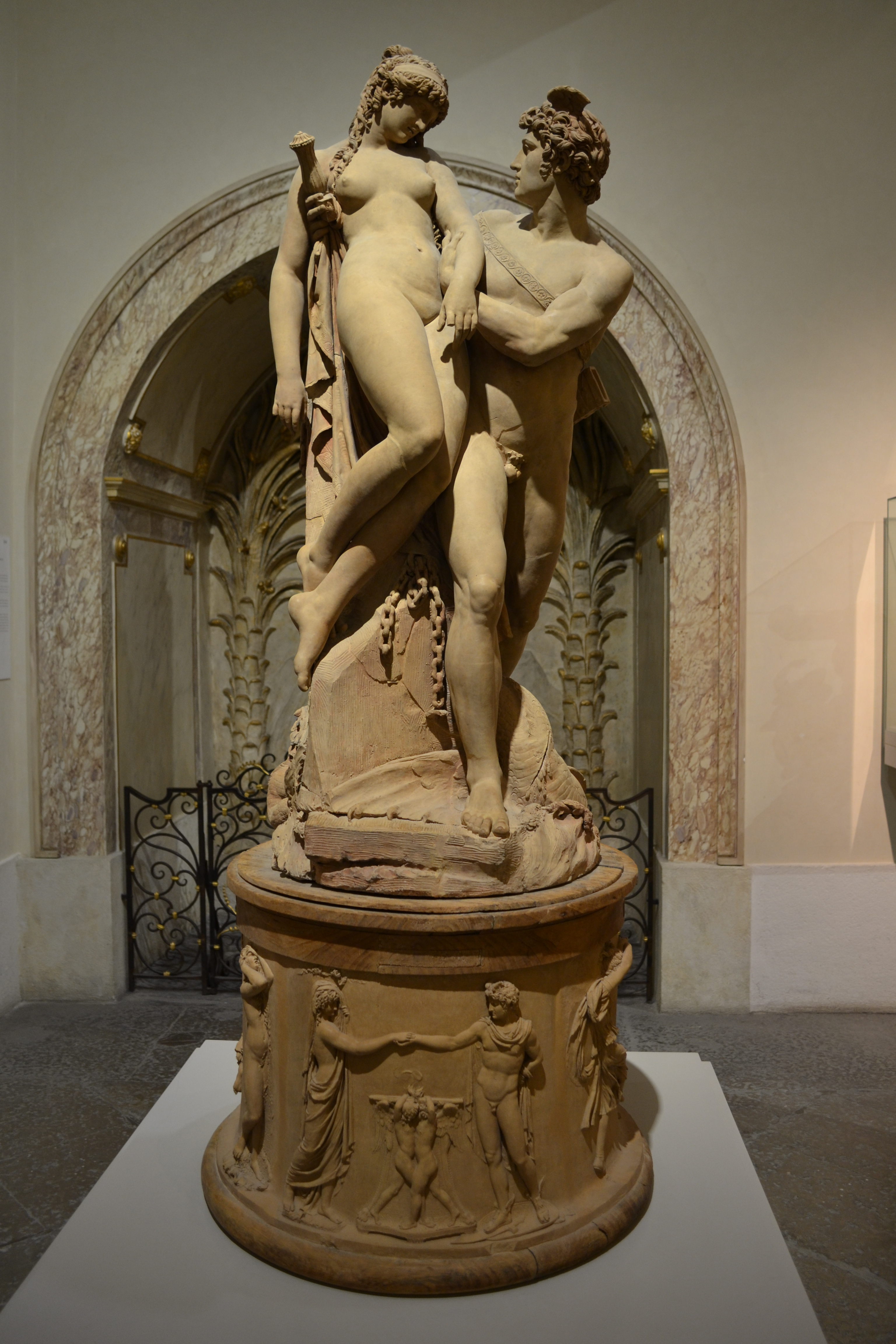 Sculpture de Joseph Chinard intitulée "Persée délivrant Andromède" vue de face